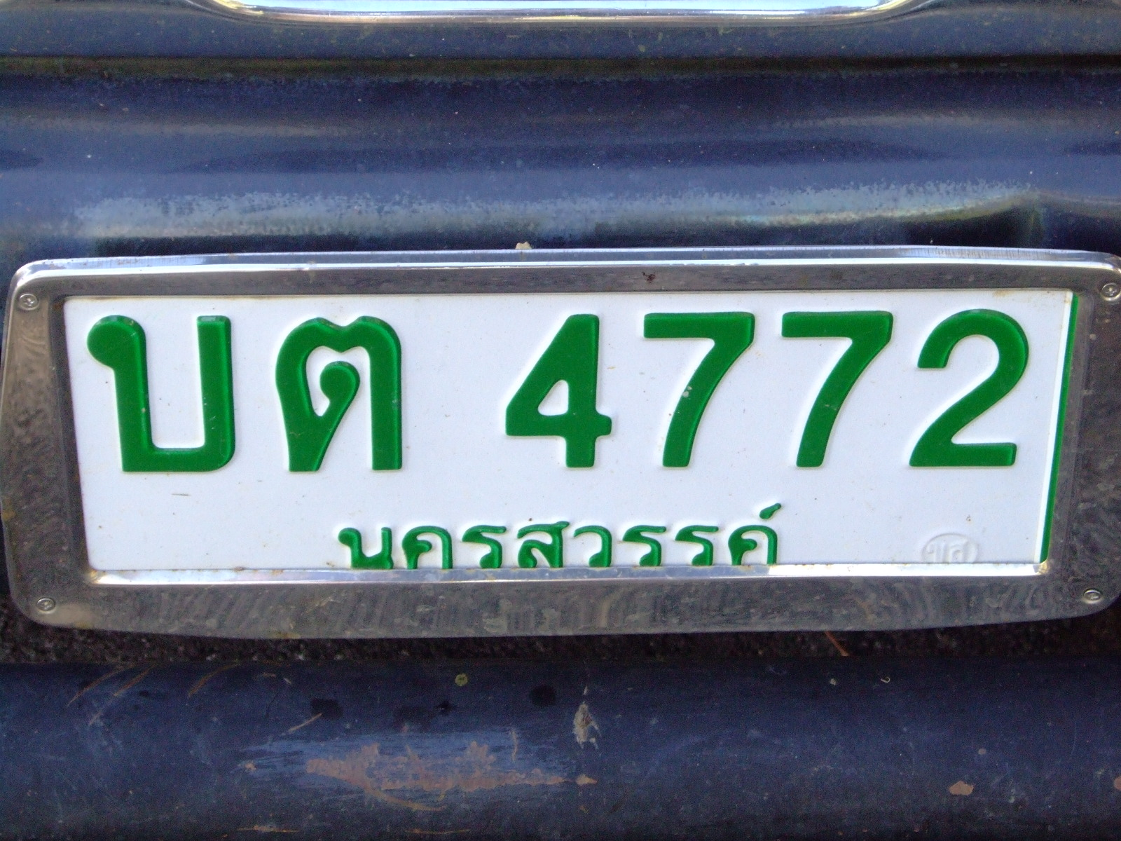 Foto propria Novembre 2009